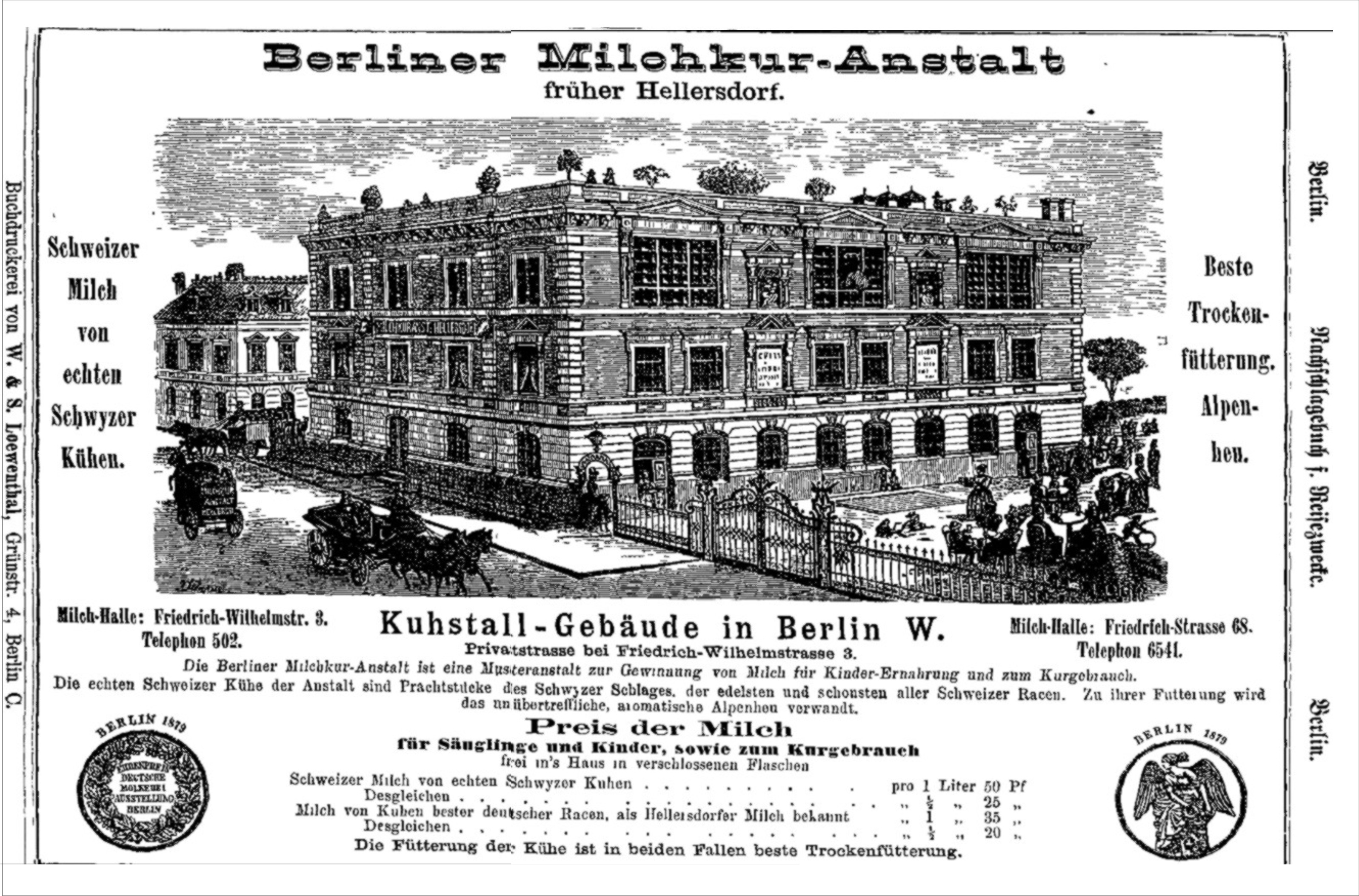 Berliner Milchkur-Anstalt Privatstraße bei der Friedrich-Wilhelm-Straße